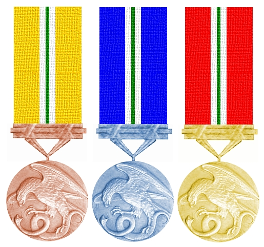 Grafische Darstellung der slowakischen Tapferkeitsmedaille aller drei Klassen (Vorderseite)